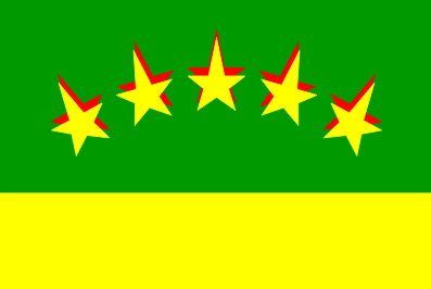 Formada por dos franjas horizontales. La superior, del doble de ancho, de color verde, con cinco estrellas alargadas y dispuestas en arco, de color amarillo con sombra de rojo. La franja inferior, amarilla. La bandera de Puntallana se basa en el primer cuartel del escudo de armas.